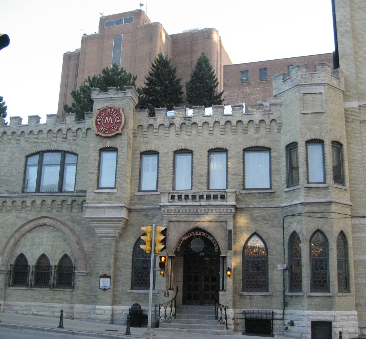 Miller Brewery